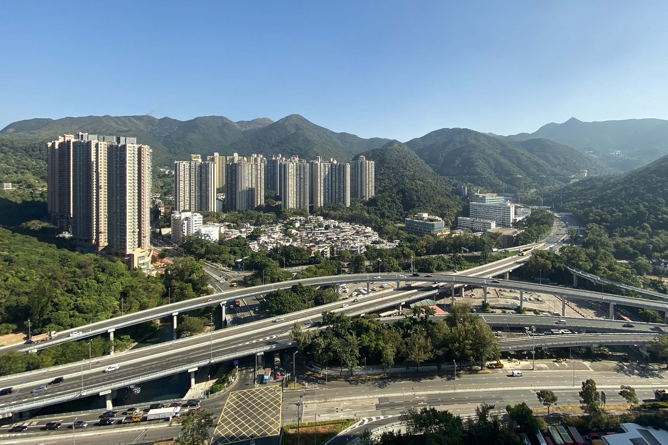 Siu Lek Yuen